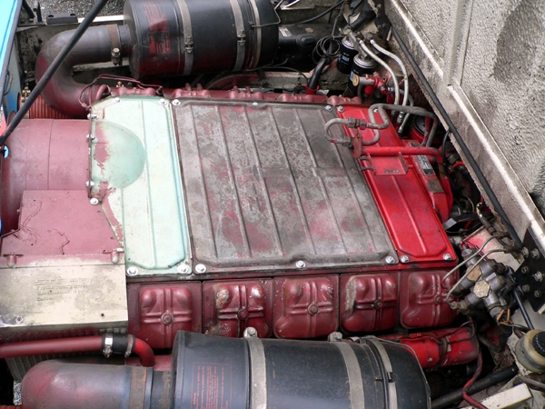 Вид сверху на двигатель F 10L 413 автомобиля Magirus-Deutz